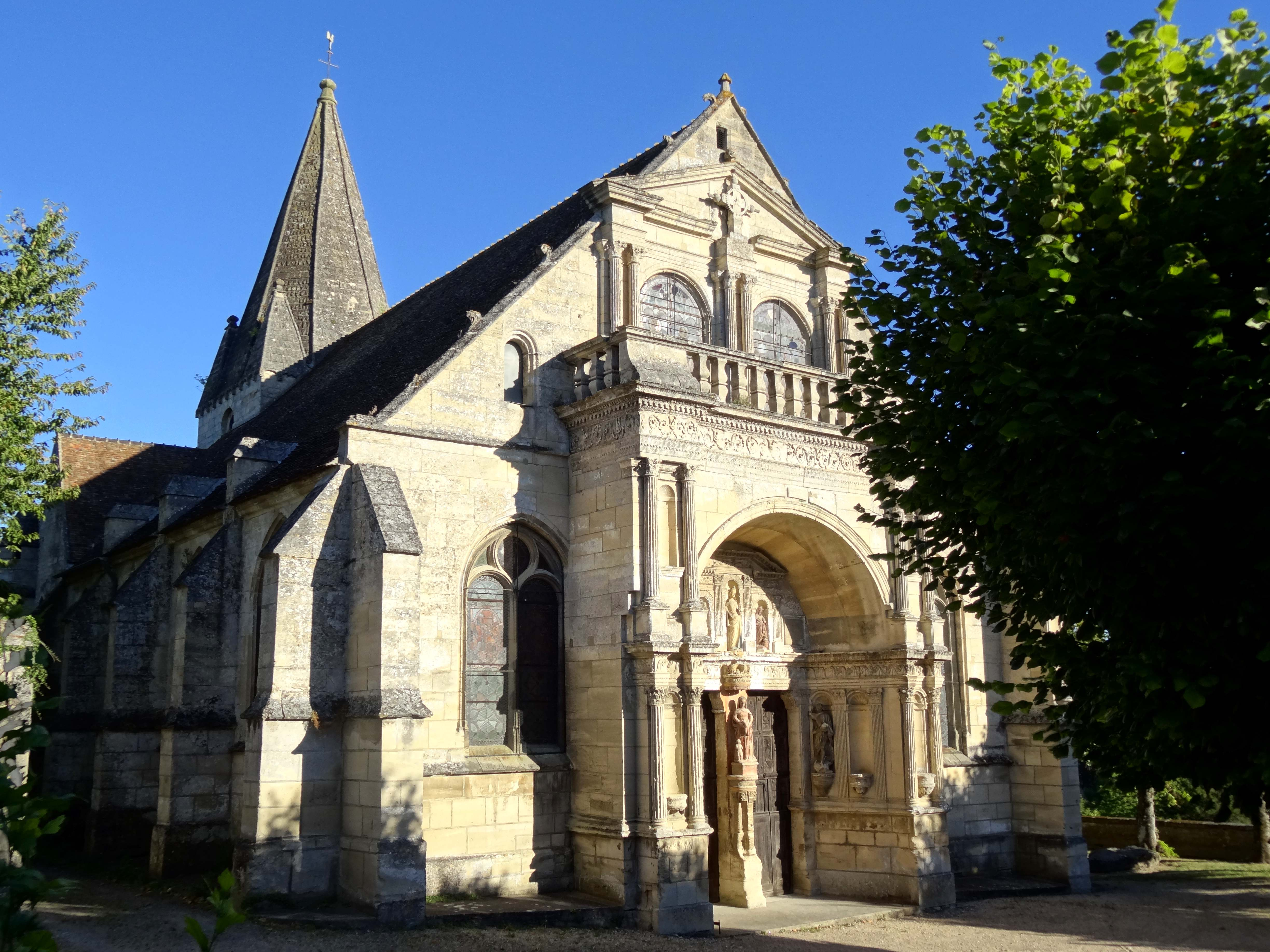 La façade principale nord-ouest de l'église avec le portail monumental Renaissance.